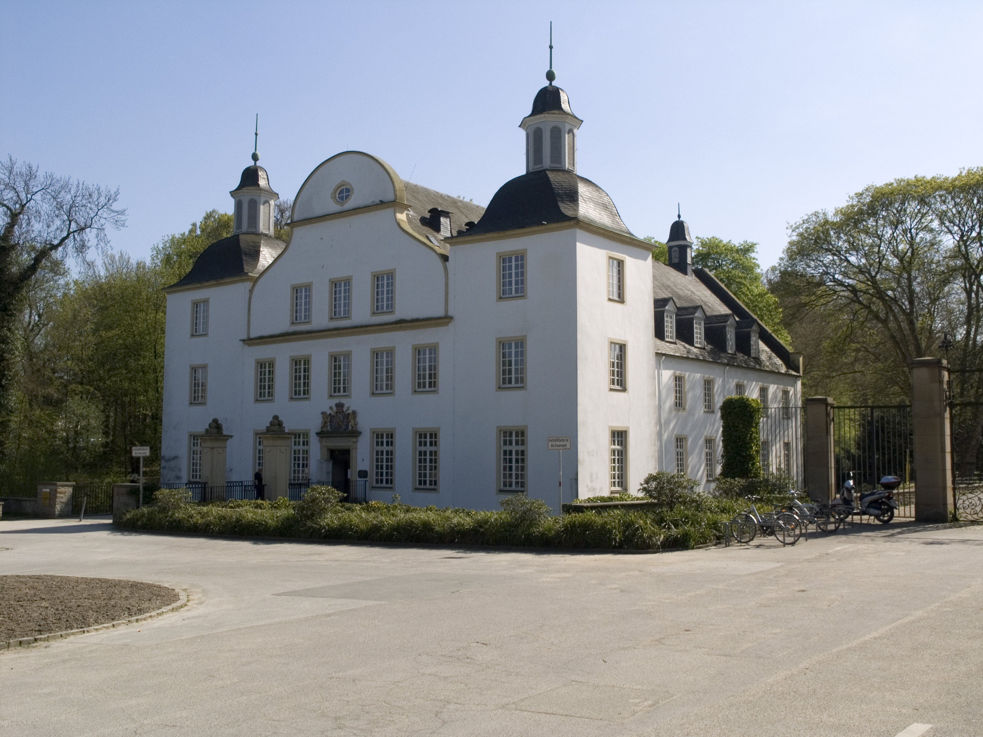 Северный Рейн - Вестфалия, Эссен - замок Борбек